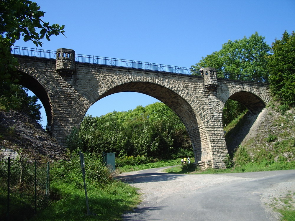 Das Viadukt von Heyerode als Teil des Radwegs